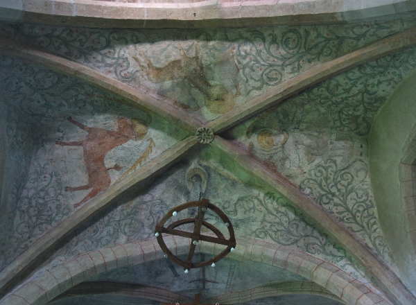 Description: Fresques de l'église fortifiée Saint-Arnould d'Arry (Moselle) XIIIe. Église de construction romane avec chœur gothique décoré de fresque représentant les quatre évangélistes au ??? siècle Auteur: François BERNARDIN